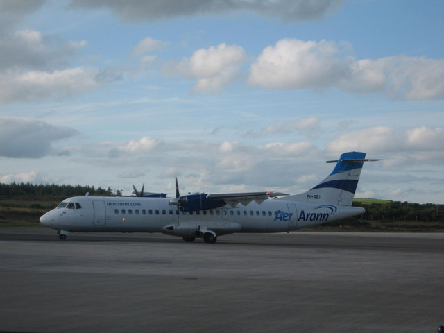 Aer Arann Aircraft